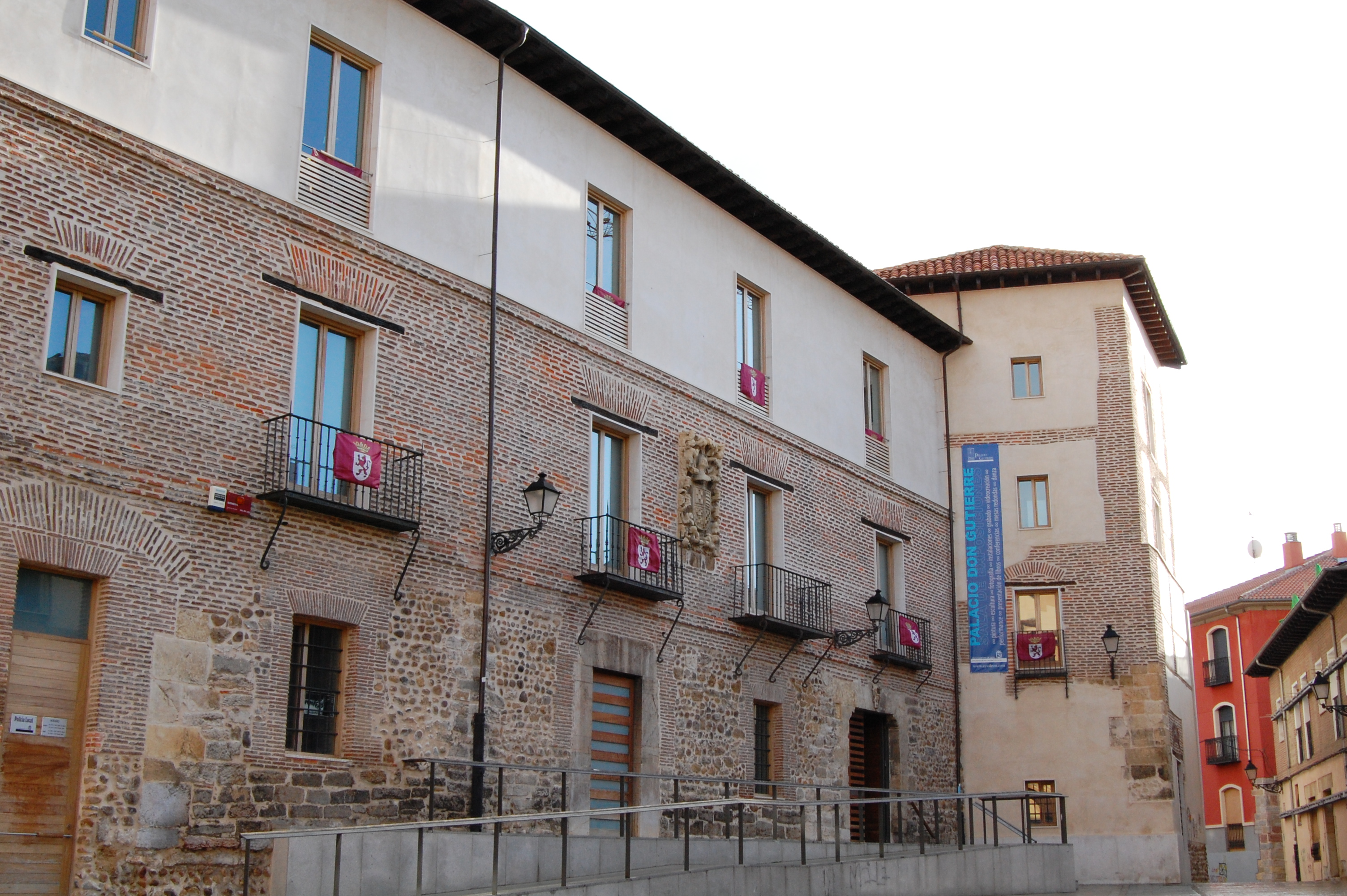 Palacio Don Gutierre de León. Situado en la plaza Don Gutierre, en el Barrio Húmedo de la capital leonesa.